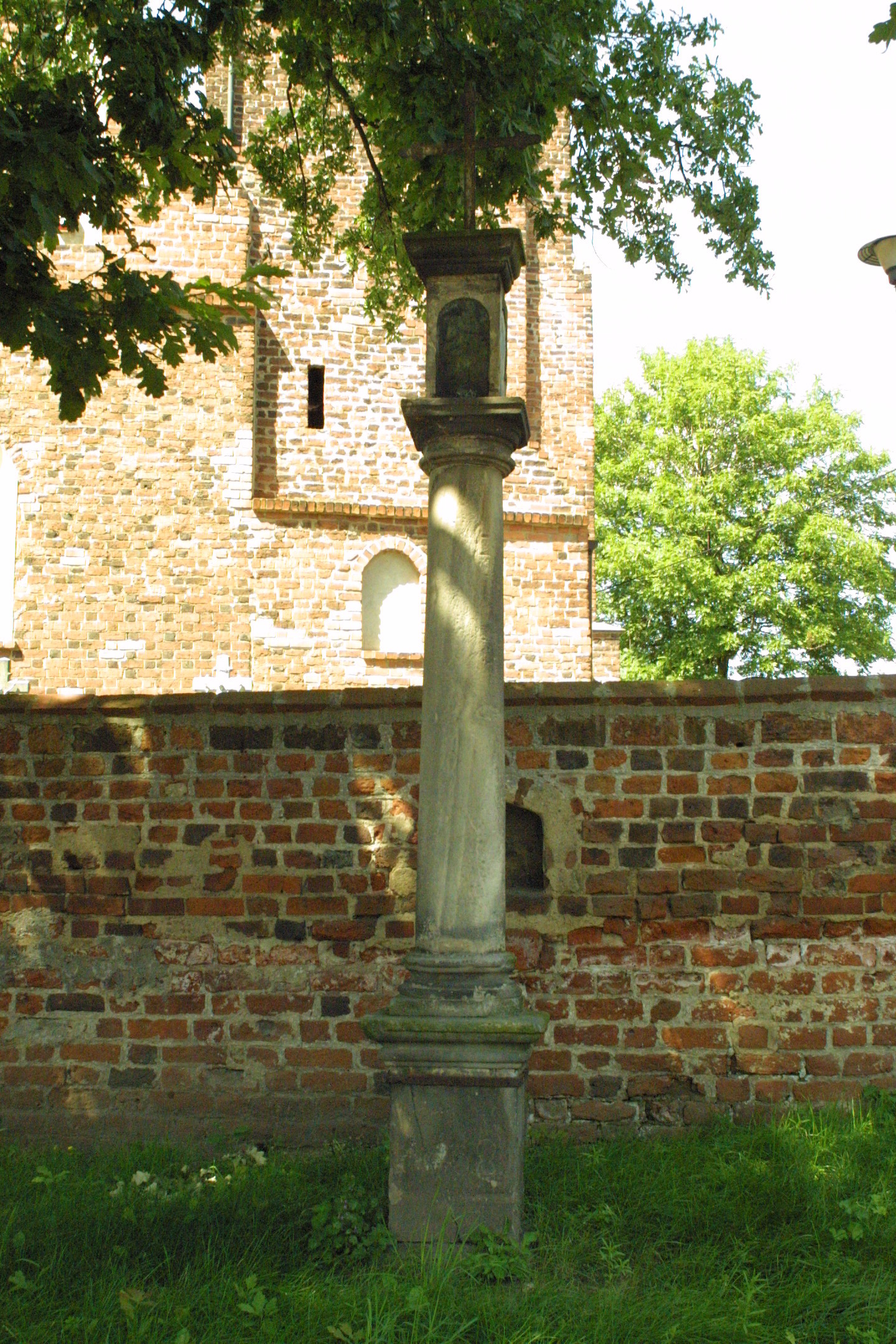 Jaszkotle - kapliczka słupowa z 1668 r. (przed kościołem parafialnym pw. Wniebowstąpienia Pana Jezusa) w formie toskańskiej kolumny. Złożona z zachowanych elementów i uzupełniona w 1932 r.